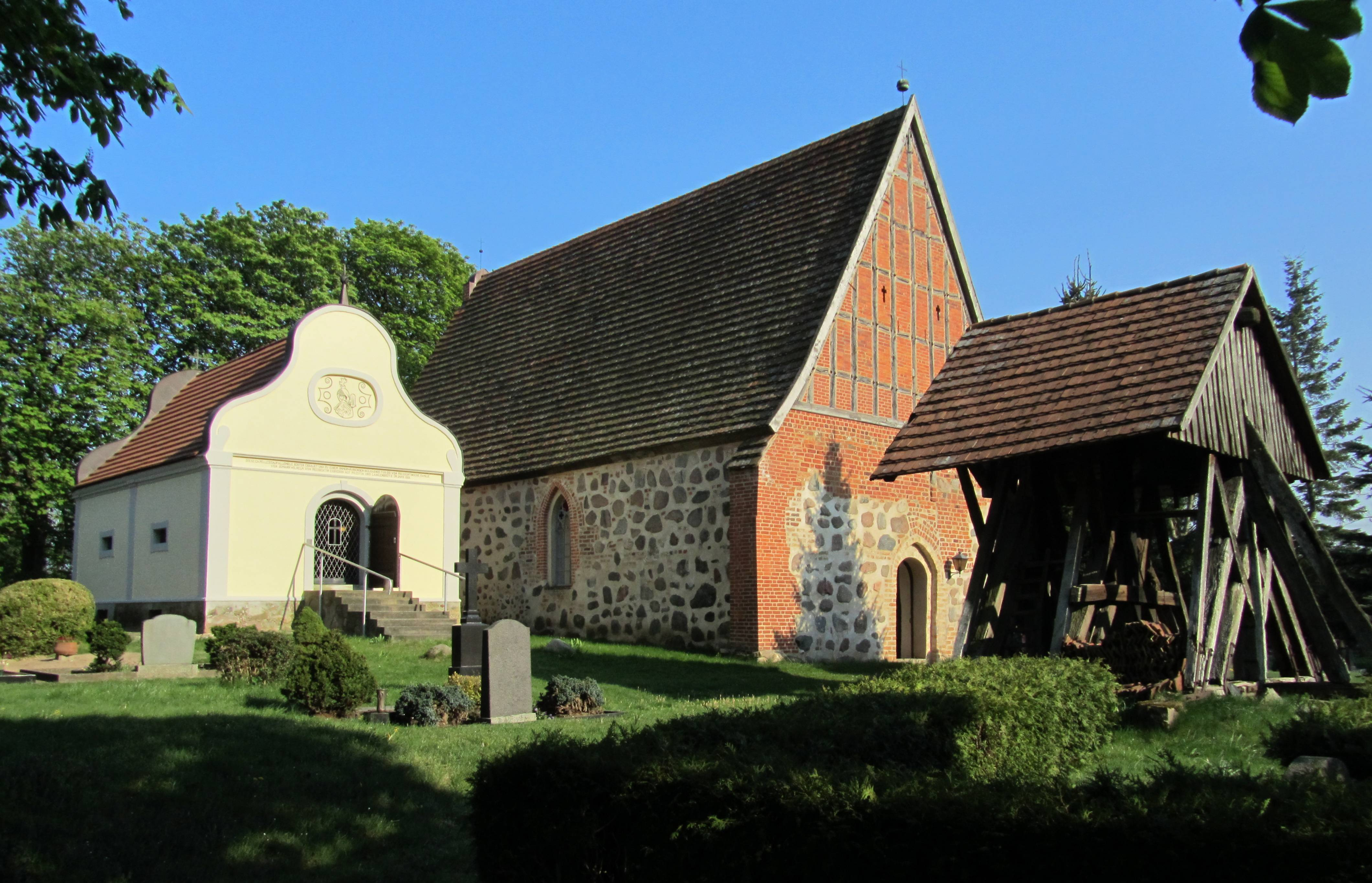 Dorfkirche und Kapelle der Pressentins in Prestin, Landkreis Ludwigslust-Parchim, Mecklenburg-Vorpommern, Deutschland